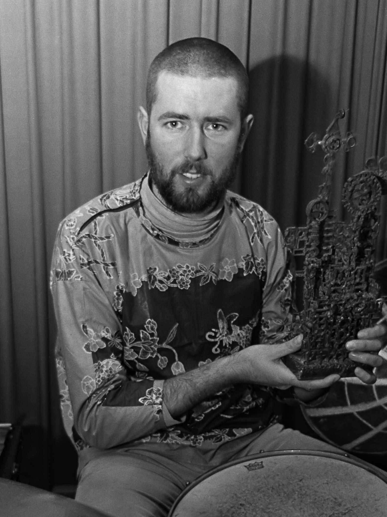 Wessel Ilckenprijs 1967 voor drummer Han Bennink 18 december 1967